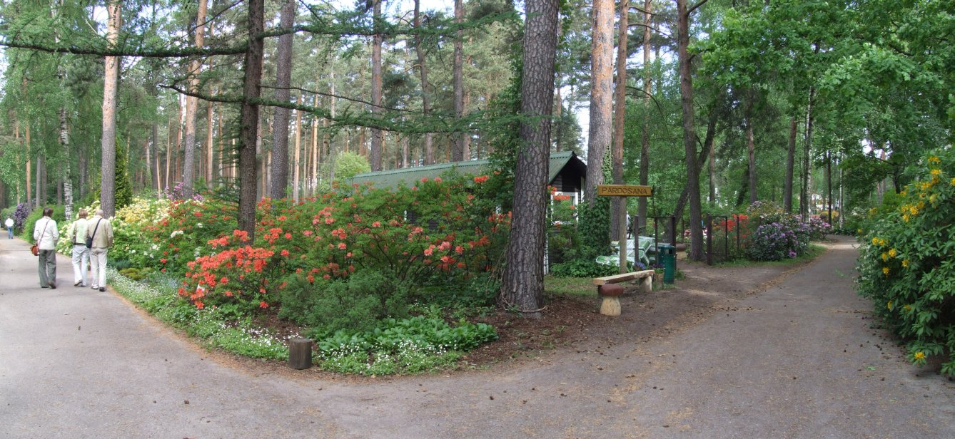 LU Rododendru selekcijas un izmēģinājumu audzētava "Babīte", 05.06.2010.